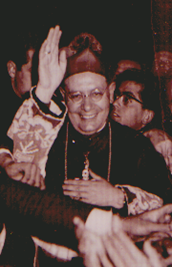 Monsignor Francesco Minerva (1904-2004)